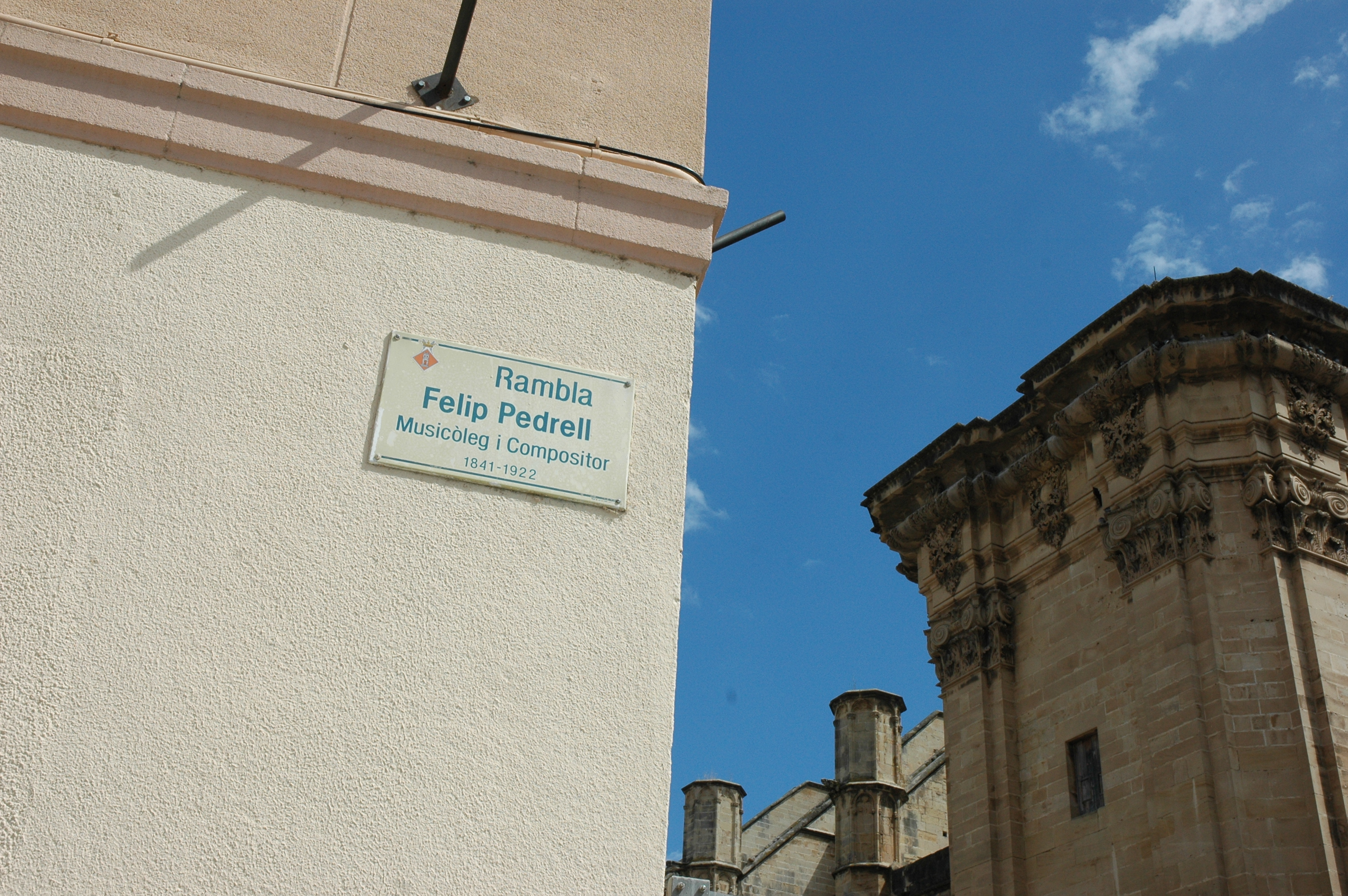 Felip Pedrell i Catredral de Tortosa